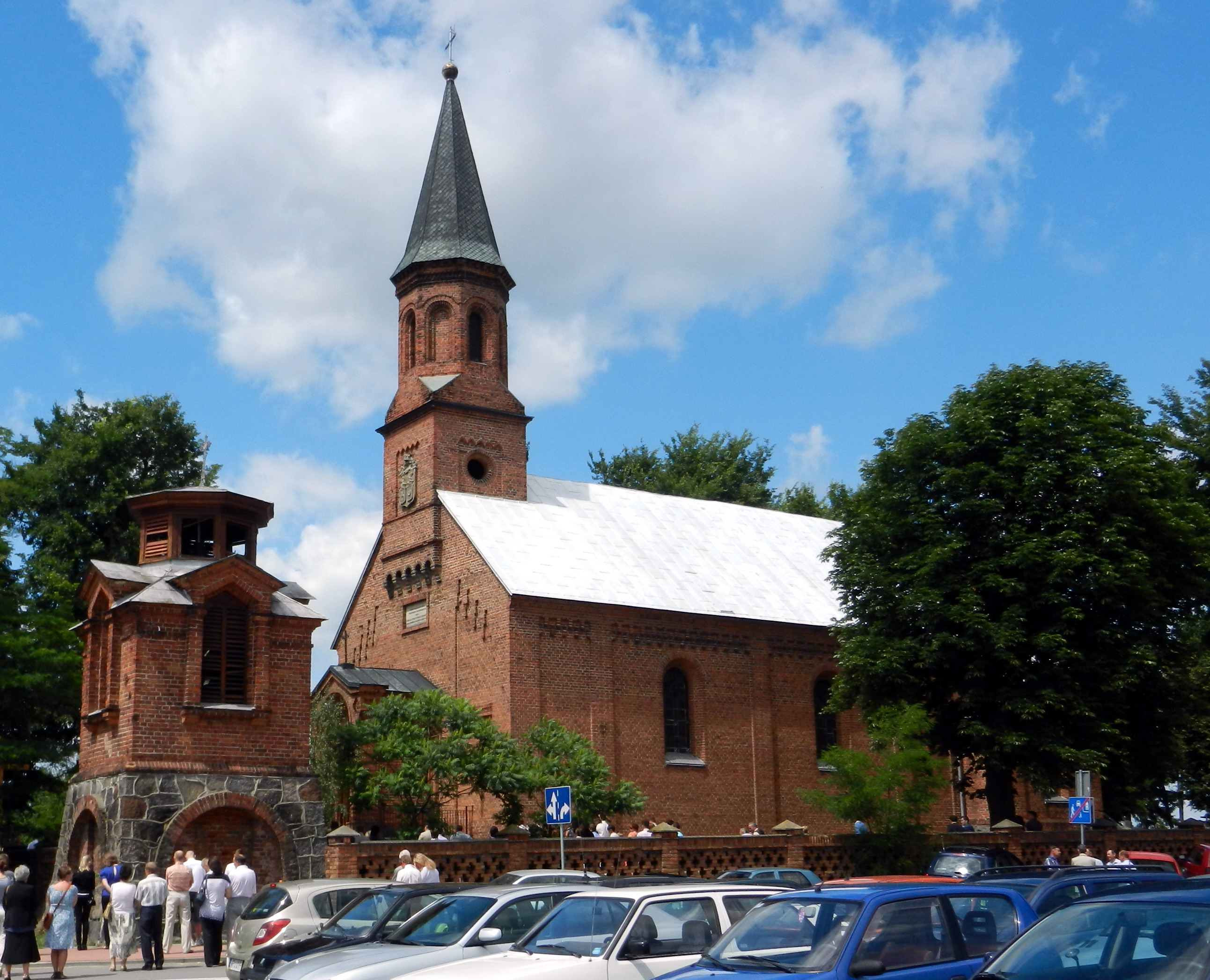 Staroźreby - kościół parafialny pw. Aniołów Stróżów (zabytek nr rejestr. 457)